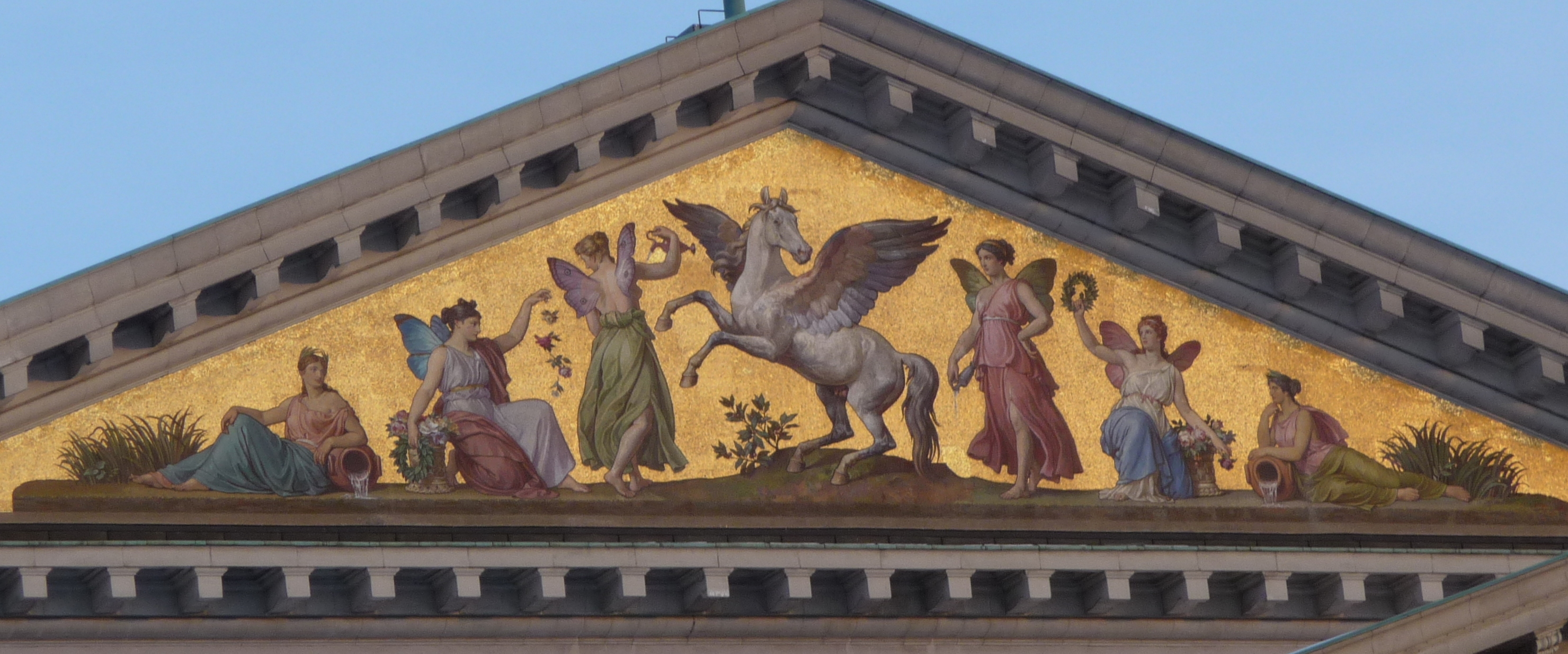 Pegasus am Giebel des Nationaltheaters in München